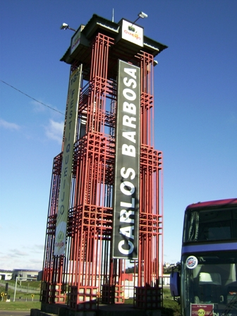 Pórtico de Entrada de Carlos Barbosa